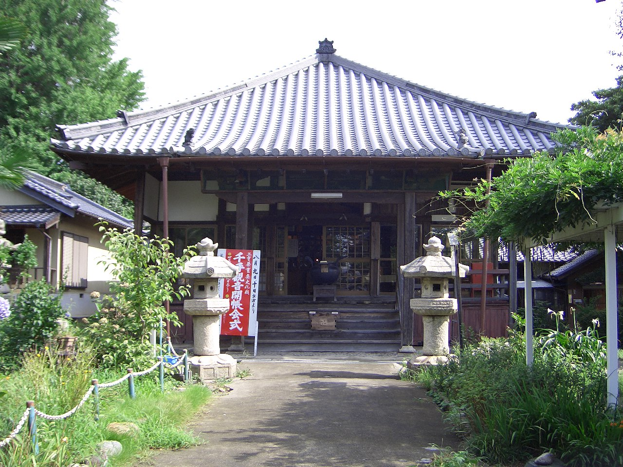 勧学寺桑名市本堂